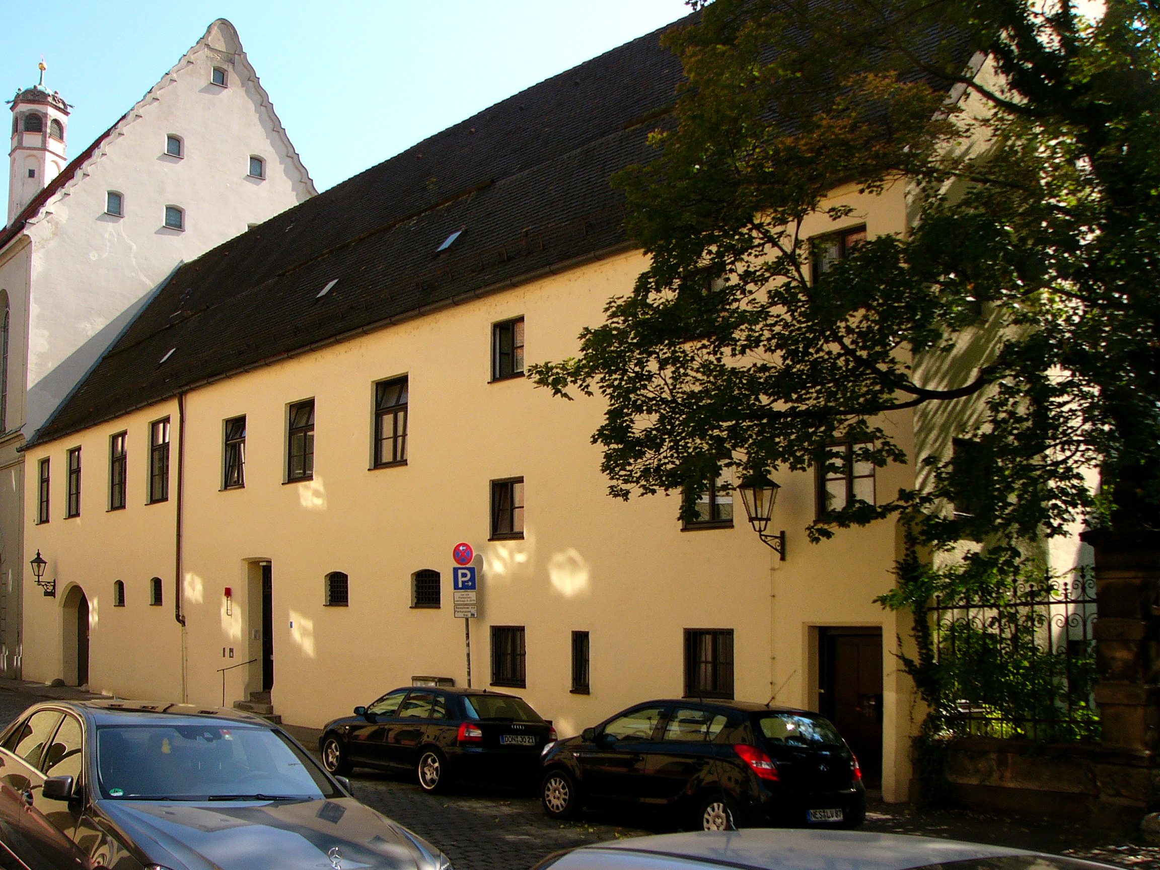 Teil des ehem. Dominikanerinnenklosters St. Katharina; zwei- bzw. dreigeschossiger Traufseitbau mit Satteldach, ursprünglich wohl drei einzelne Häuser, 16. Jahrhundert.This is a photograph of an architectural monument.